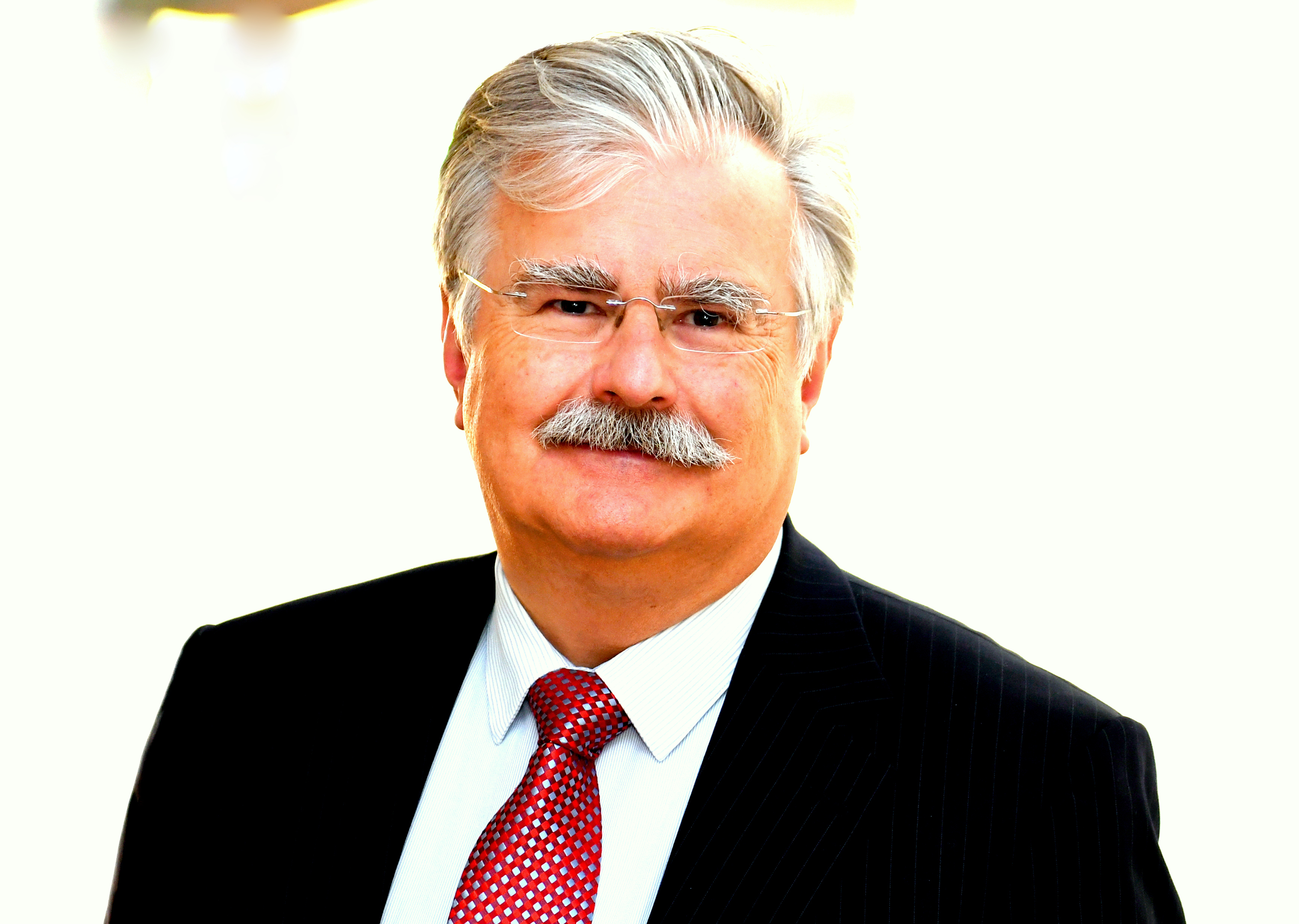 Stefan Laufer, 2019